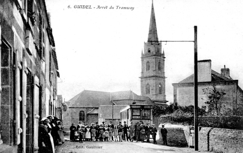 Le bourg de Guidel vers 1920 (église et arrêt du tramway).